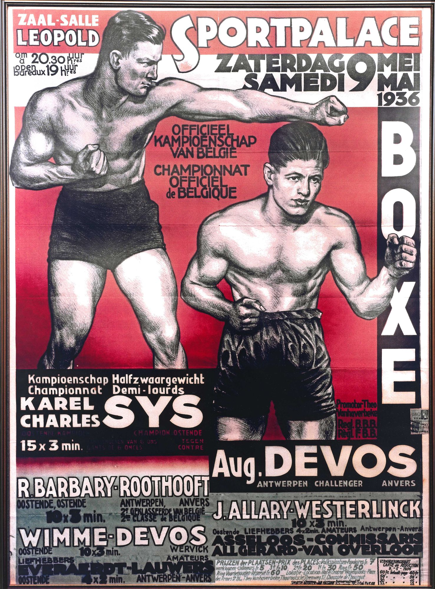 Boksen, affiche boksavond in zaal Leopold - Sportpaleis.Op 9 mei 1936 om 20.30 uur. Kampen: - BK halfzwaargewicht: Karel Sys vs. August Devos - R. Barbary vs. Roothooft - J. Allary vs. Westerlinck - Wimme vs. Devos - Asseloos vs. Commissaris - All Gerard vs. Van Overloop - Everaerdt (Oscar Everaert?) vs. Lauwers